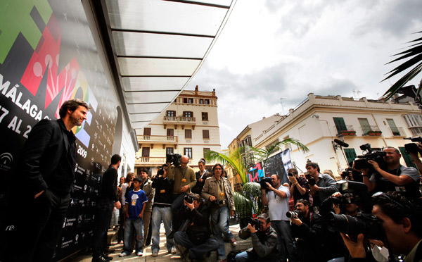 El actor Alberto San Juan, protagonista de la película La Verguenza, el día de la inauguración en el Teatro Cervantes del Festival de Cine Español de Málaga.